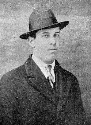 Bernard Marcel Porto, fotografía en Vida Gallega 1924